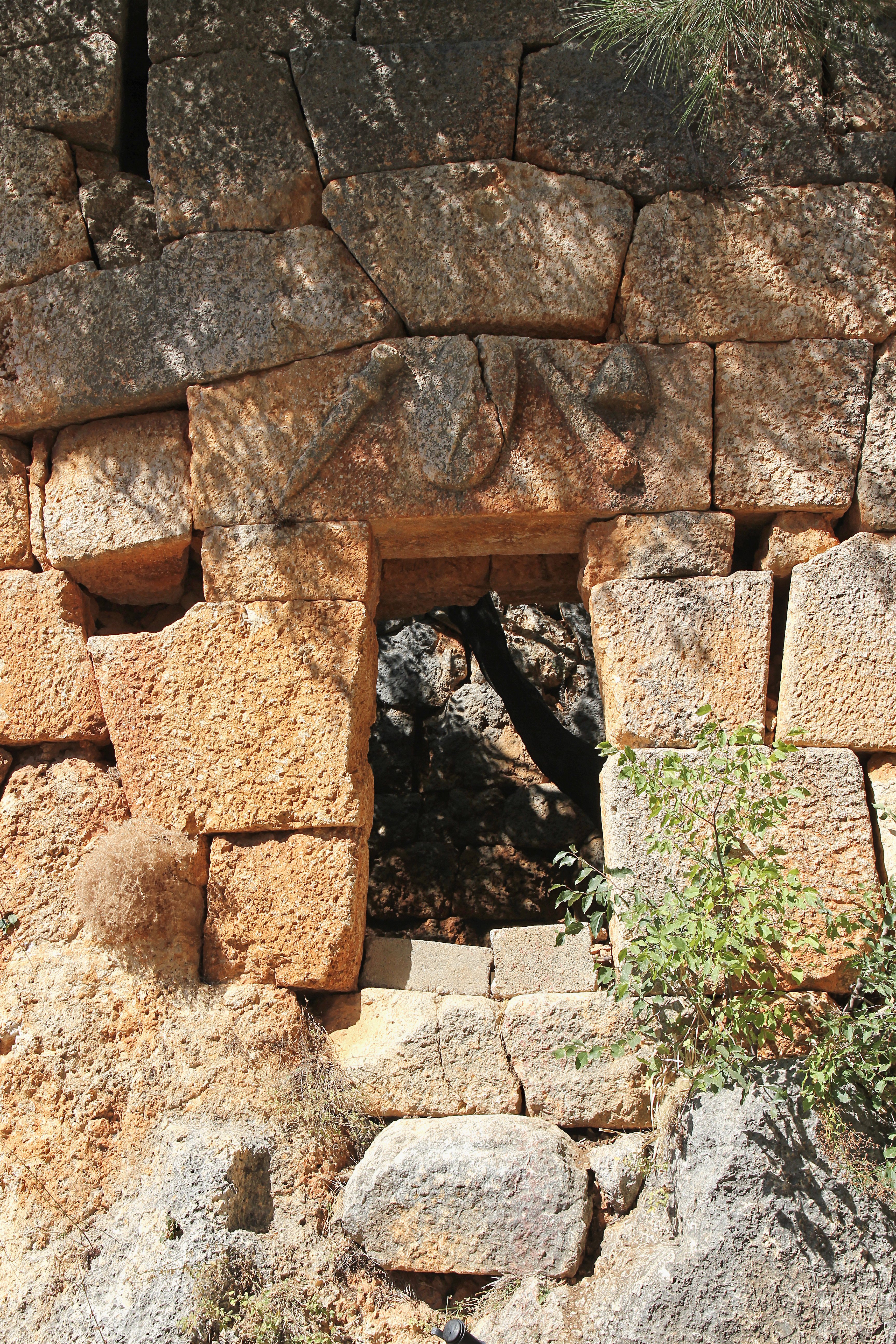 Kilikischer Turm von Hançerli bei Kızkalesi in der Südtürkei, auf dem Tüsturz Olbische Zeichen: Schwert, Schild, Keule und Dioskurenkappe